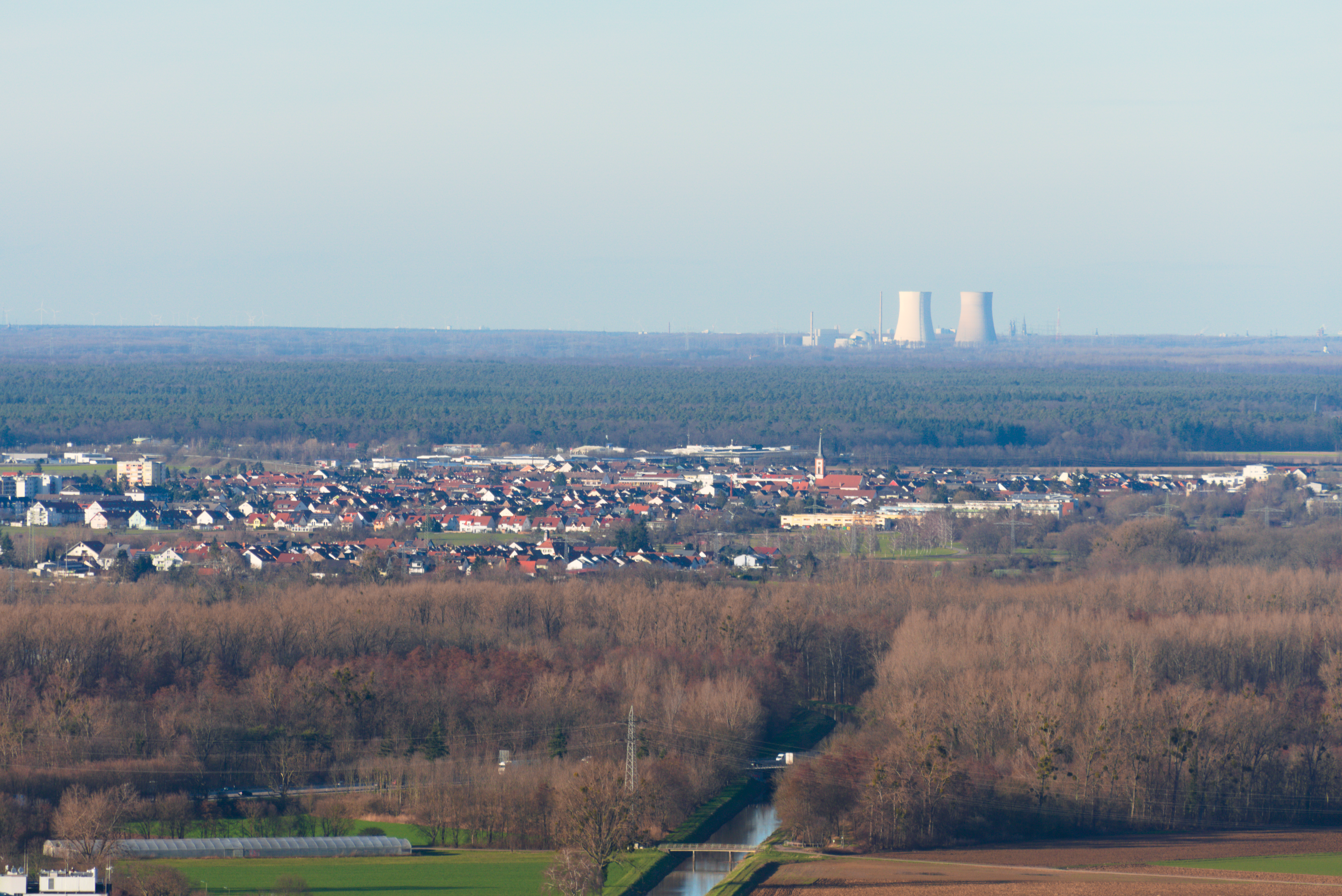 Blick auf den Ort Blankenloch von der Turmberg-Ruine in Karlsruhe-Durlach. Am Horizont sichtbar sind das Kernkraftwerk Philippsburg sowie die Türme der Gedächtniskirche der Protestation und der Josephskirche (beide Speyer). Am unteren Bildrand ist die Pfinz zu sehen.